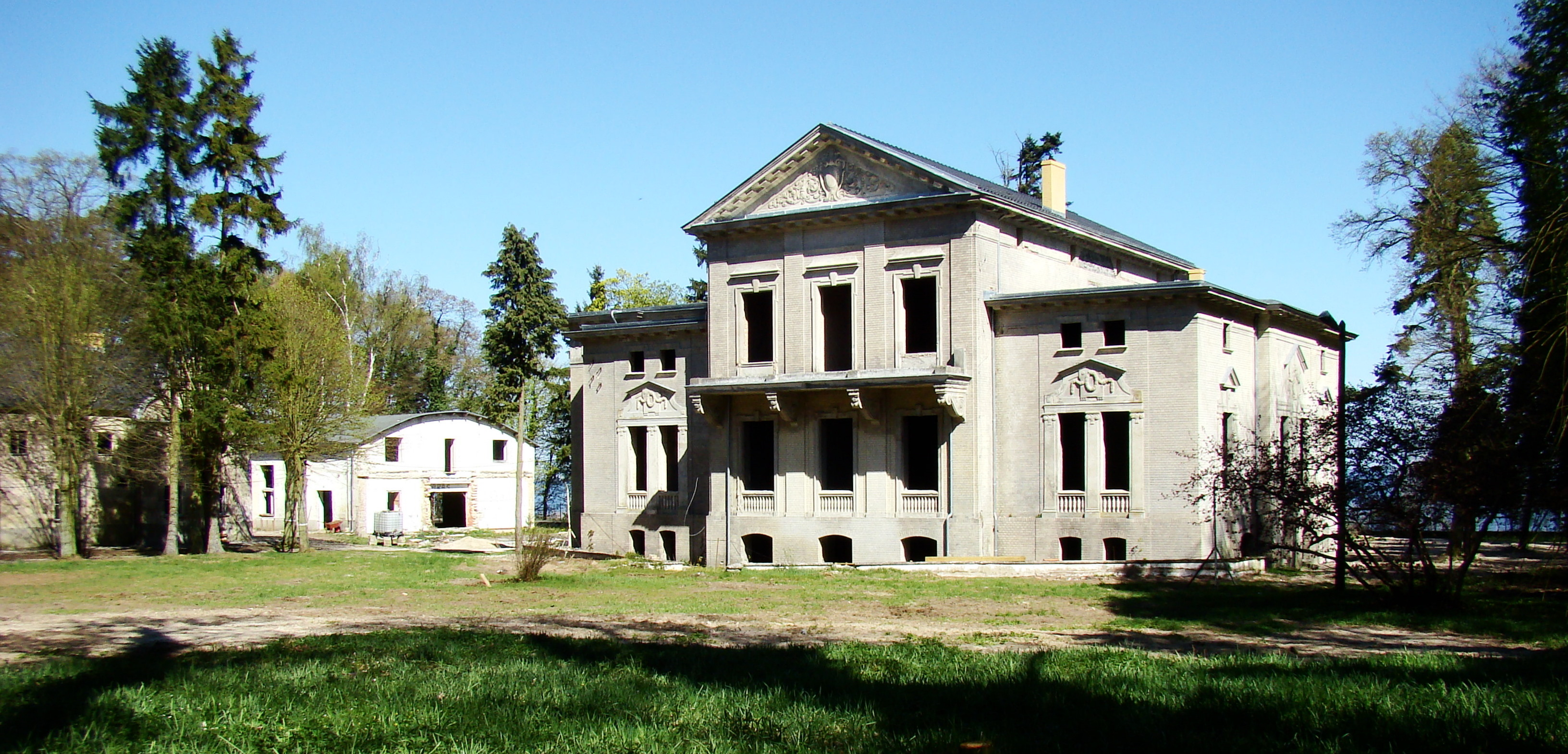 Trzebieradz, Pałac była siedziba WOP (Gmina Nowe Warpno, Województwo zachodniopomorskie), Polska